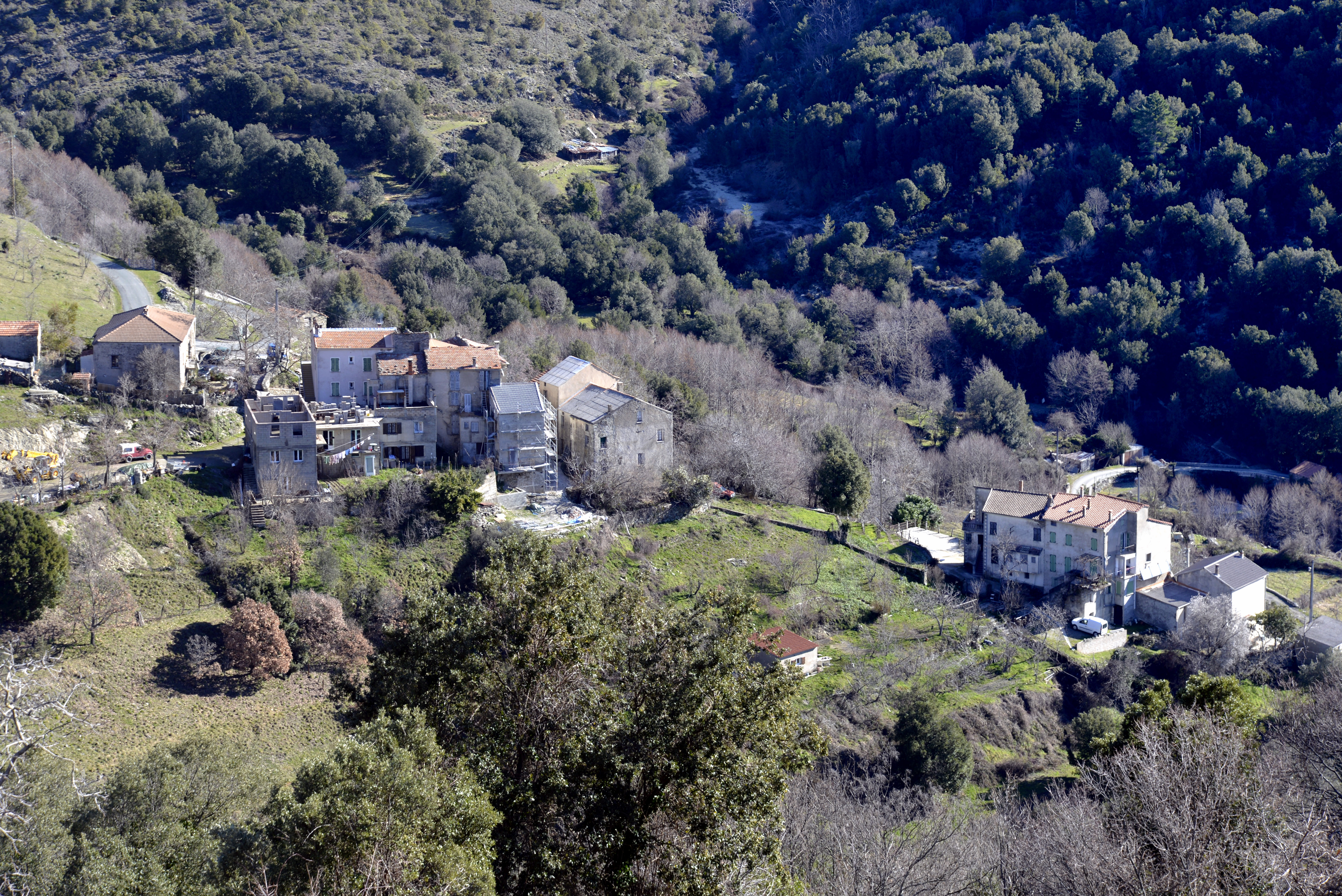 Santa-Lucia-di-Mercurio, Bozio (Haute-Corse) - Le hameau de Poggiolo (u Pughjolu) vu depuis la D41 à la sortie du village.